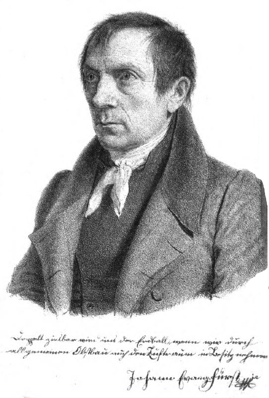 Porträt von Johann Evanglist Fürst